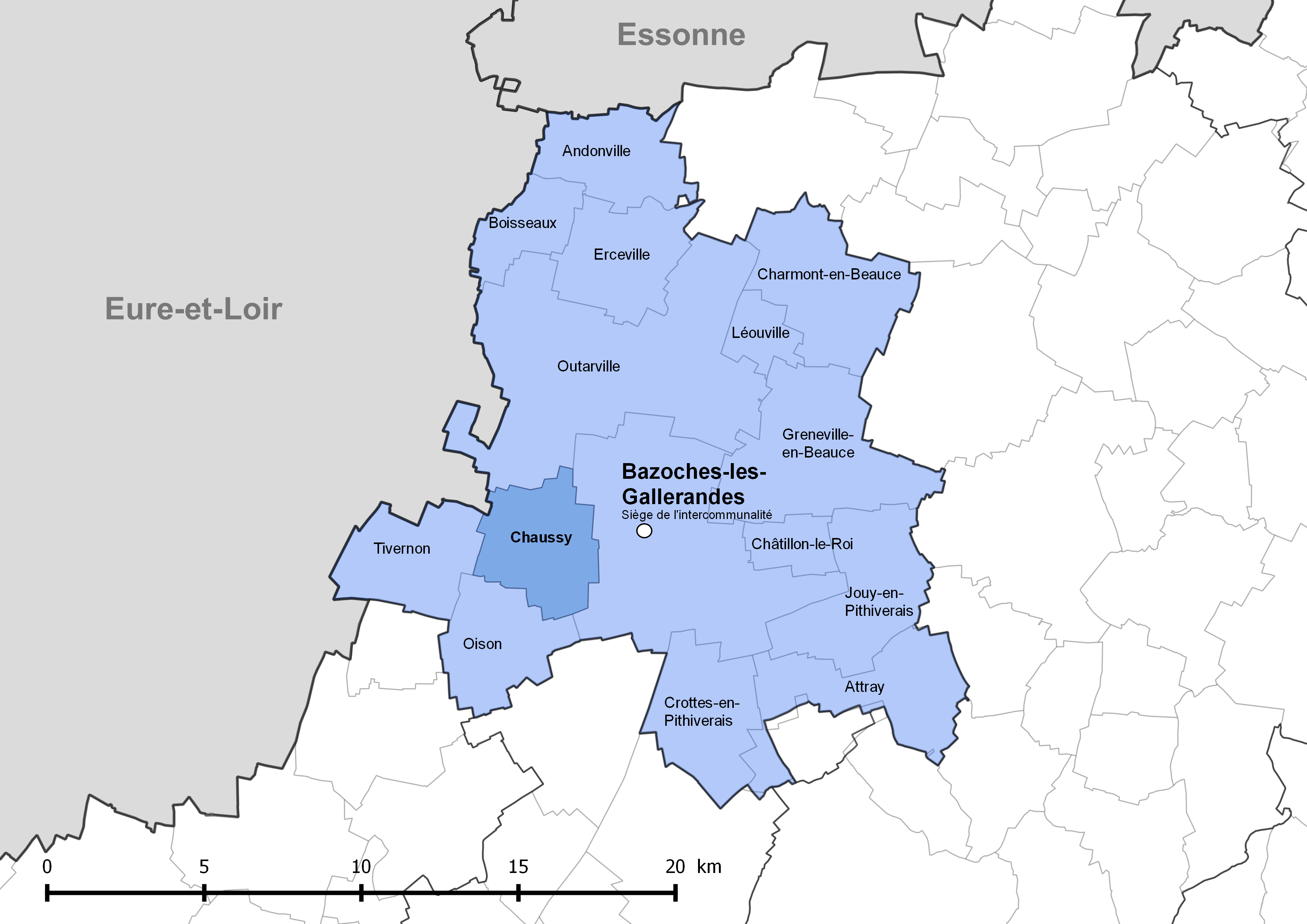 Périmètre de la communauté de communes de la Plaine du Nord Loiret - Situation de la commune de Chaussy (Loiret).